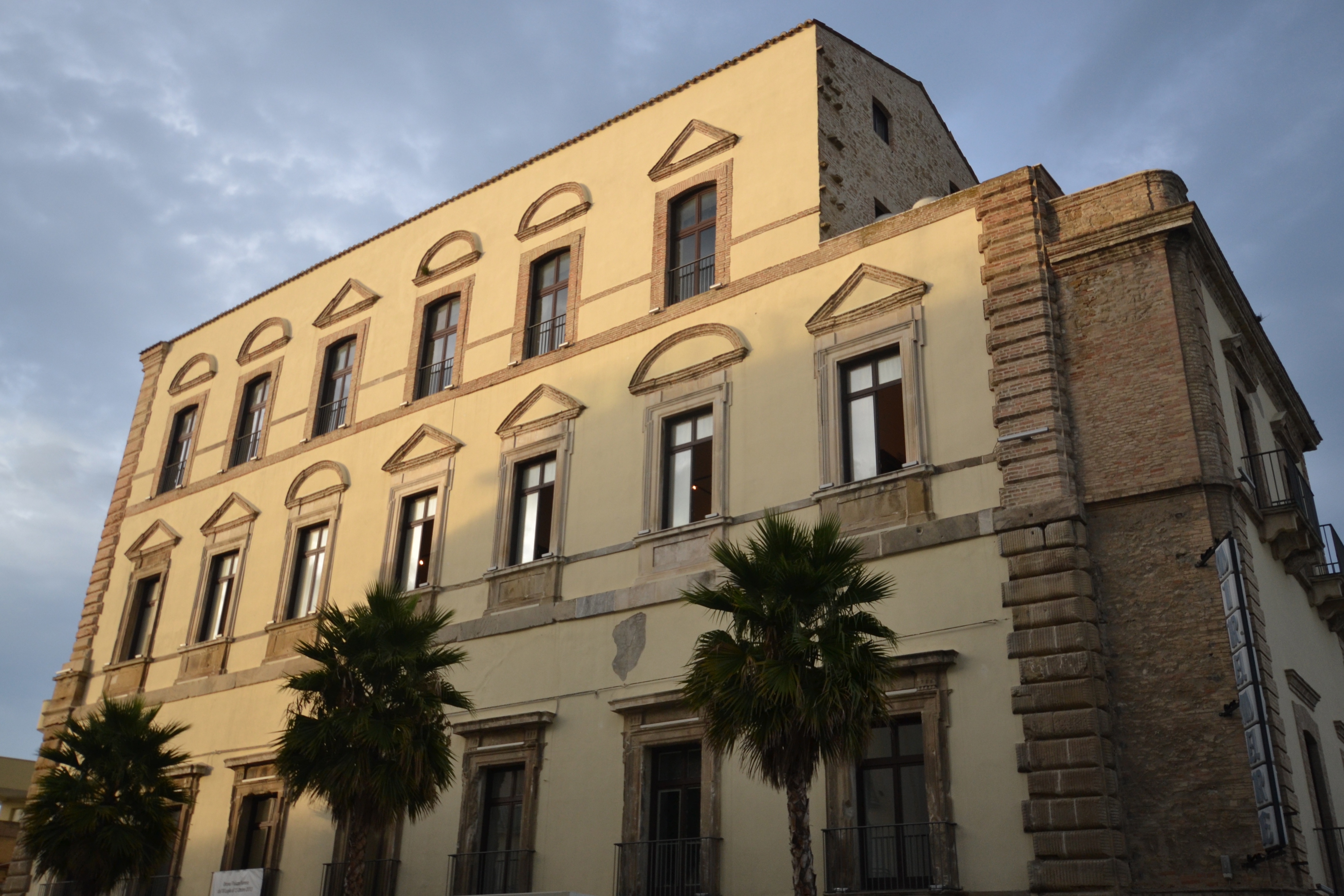 Palazzo Farnese (esterni) This is a photo of a monument which is part of cultural heritage of Italy.